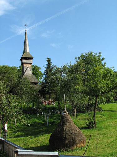 reprezintă Biserica de lemn din Poienile Izei, latura sudică. Fotografia aparţine utilizatorului Asterix, care a oferit-o domeniului public în martie ro:2007.